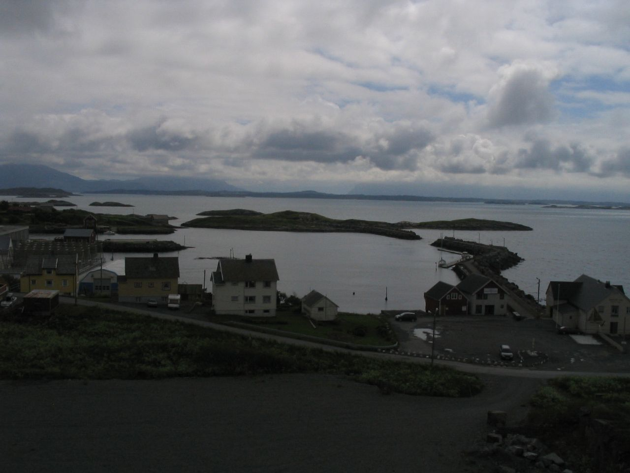 Bud i Fræna kommune Bud es un pequeño pueblo de pescadores y casas de retiro muy chulas (una especie de urbanización de lujo extraña), acariciado por el Atlántico.